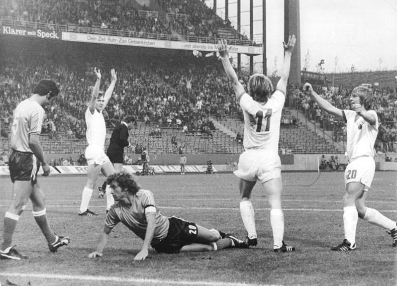 ADN-ZB-Mittelstädt-3.7.74-ma-BRD-Gelsenkirchen: X. Fußball-Weltmeisterschaft-2. Finalrunde, Gruppe A: Argentinien - DDR 1:1- Jubel bei den DDR-Spielern nach dem 1:0 in der 14. Minute. Von rechts: Martin Hoffmann, Torschütze Joachim Streich und Rüdiger Schnuphase. Am Boden Enrique Wolff und links Angel Hugo Bargas (beide Argentinien).